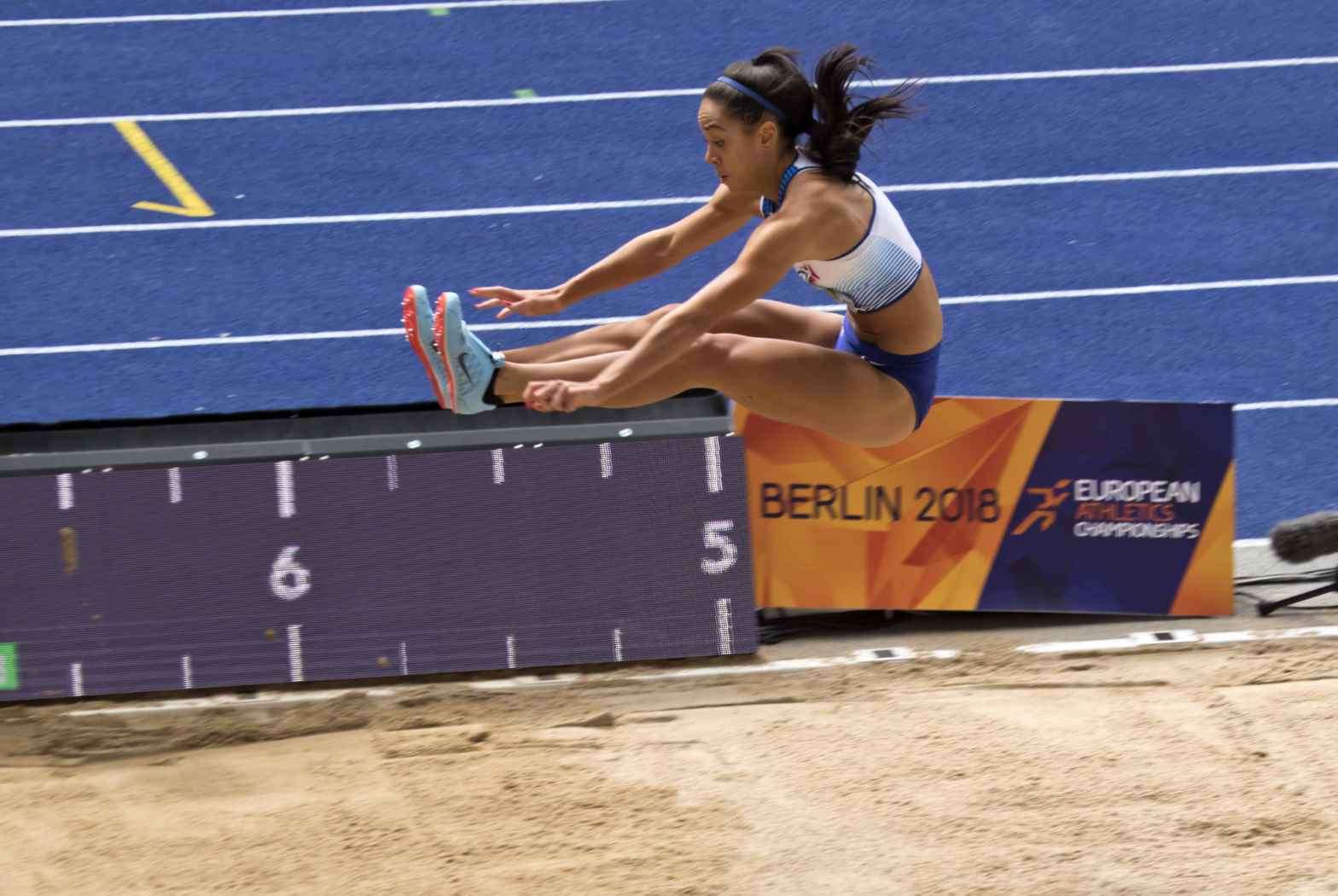 EKB42018 ver kjt